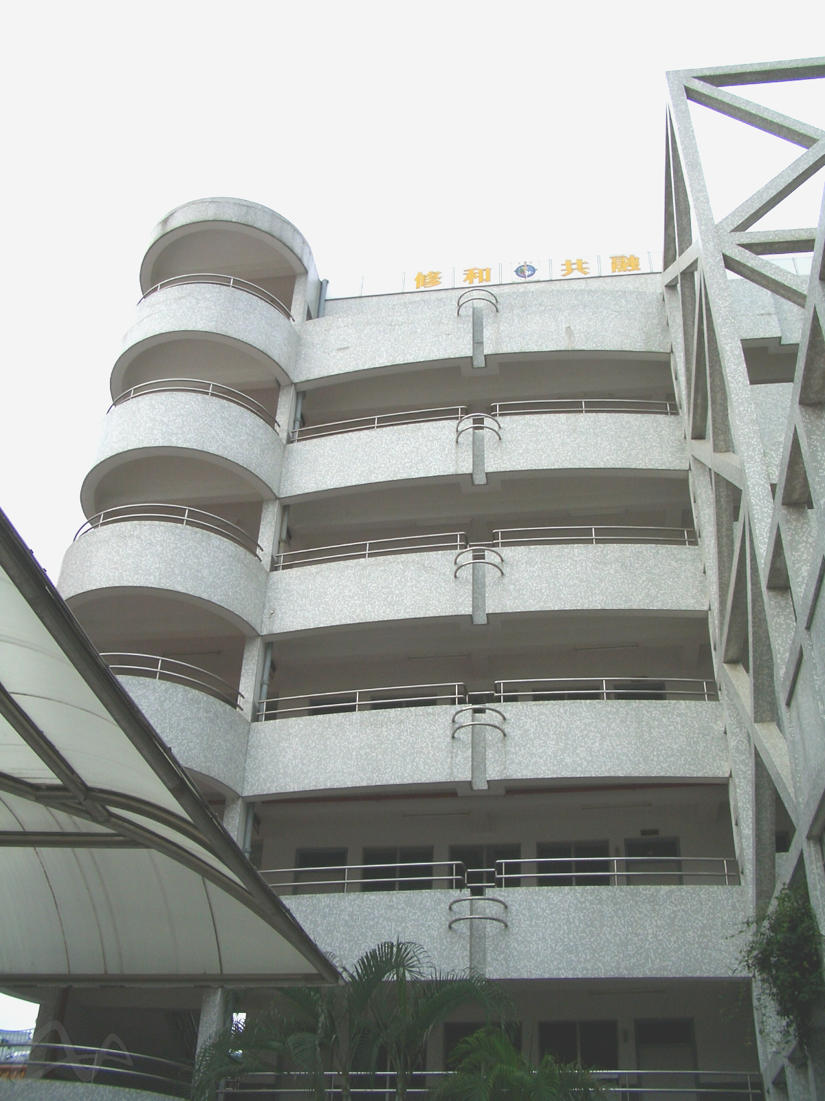 粵華中學納德樓。